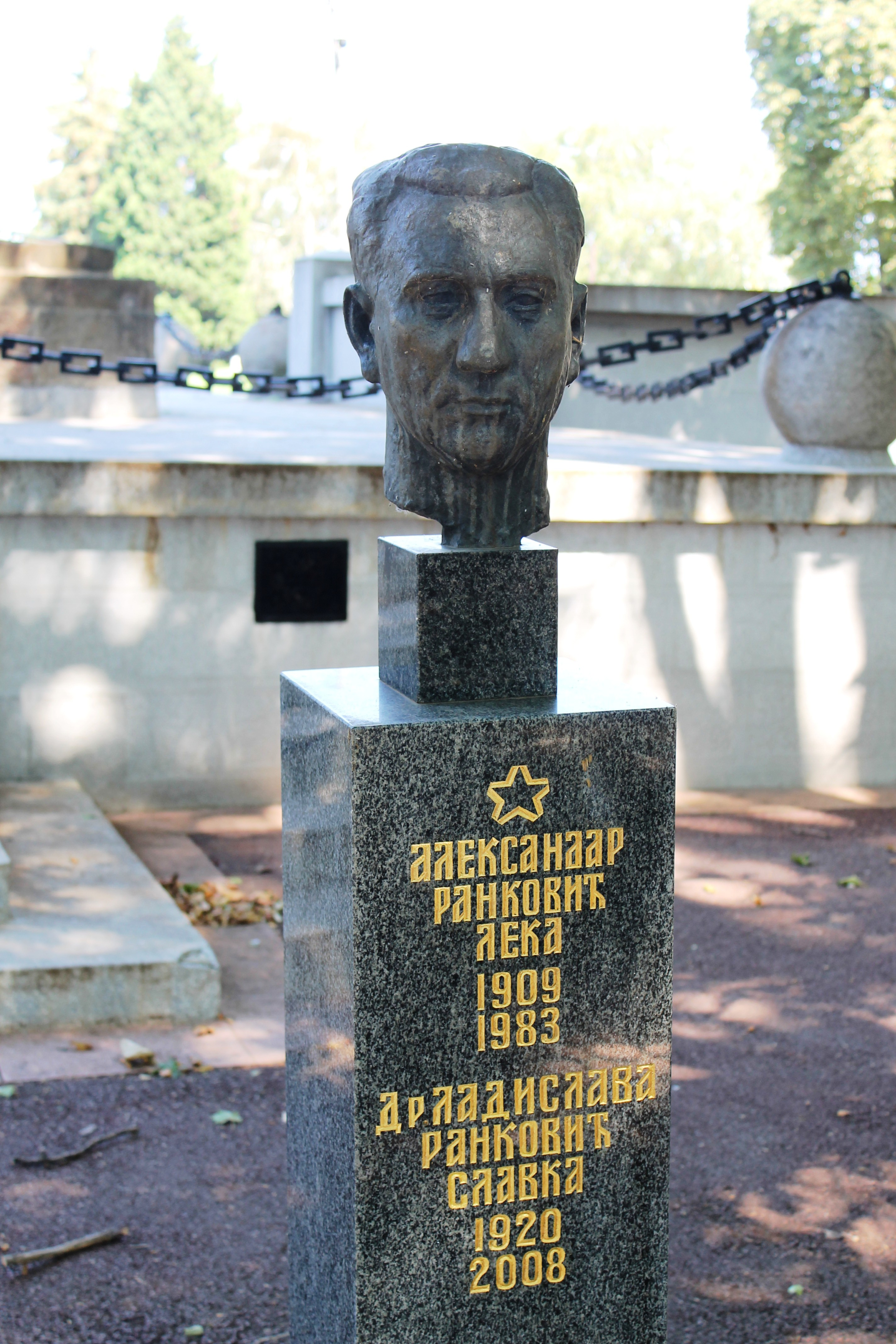 Grob Aleksandra Leke Rankovića na Novom groblju